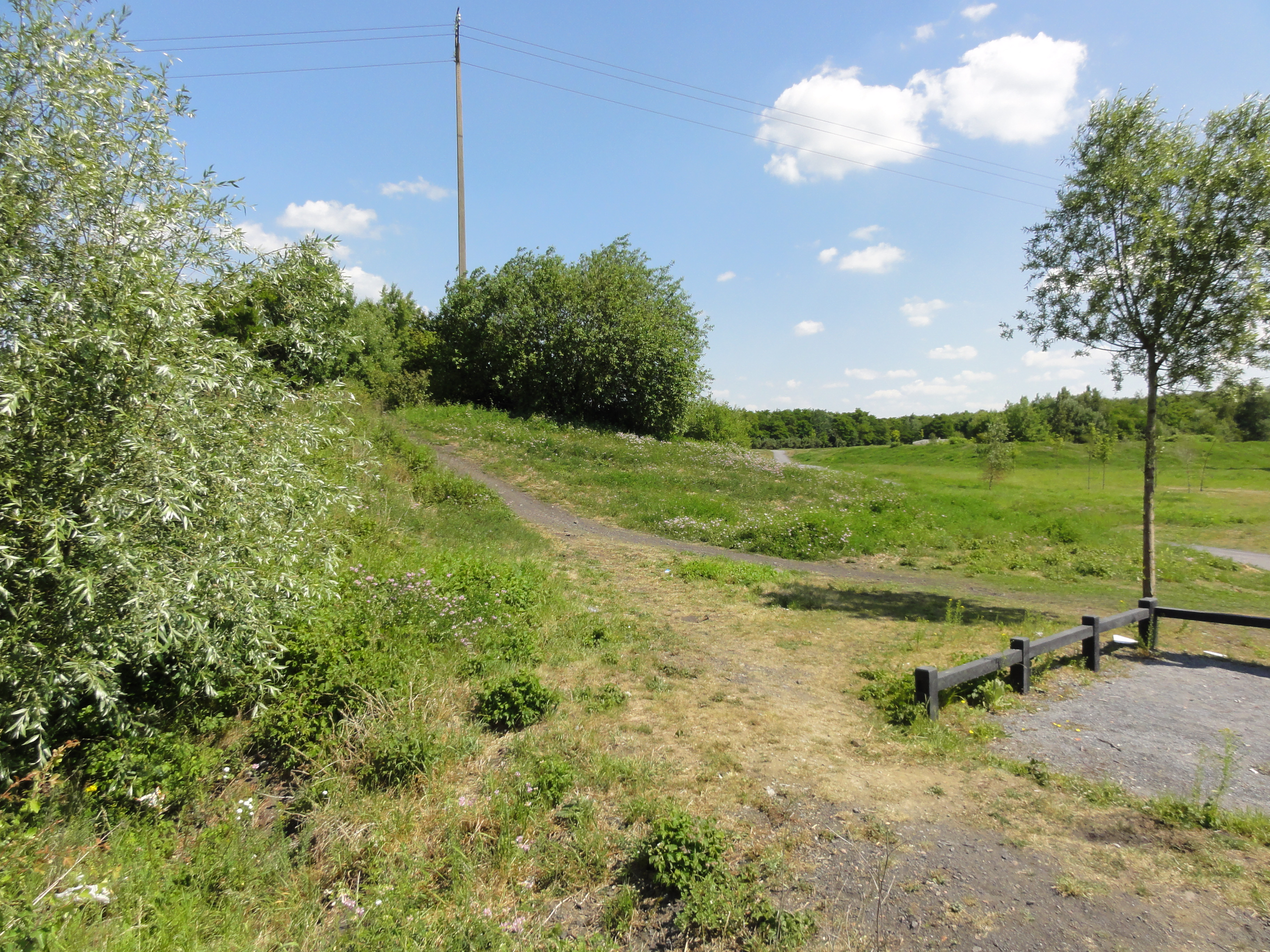 Terril n° 146 dit Centrale de Dechy, Centrale de Dechy du Groupe de Douai, Dechy, Nord, Nord-Pas-de-Calais, France.